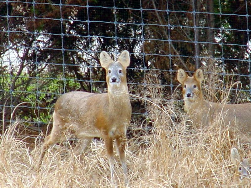 Vannrådyr. Fotograf: Jinsuk Kim